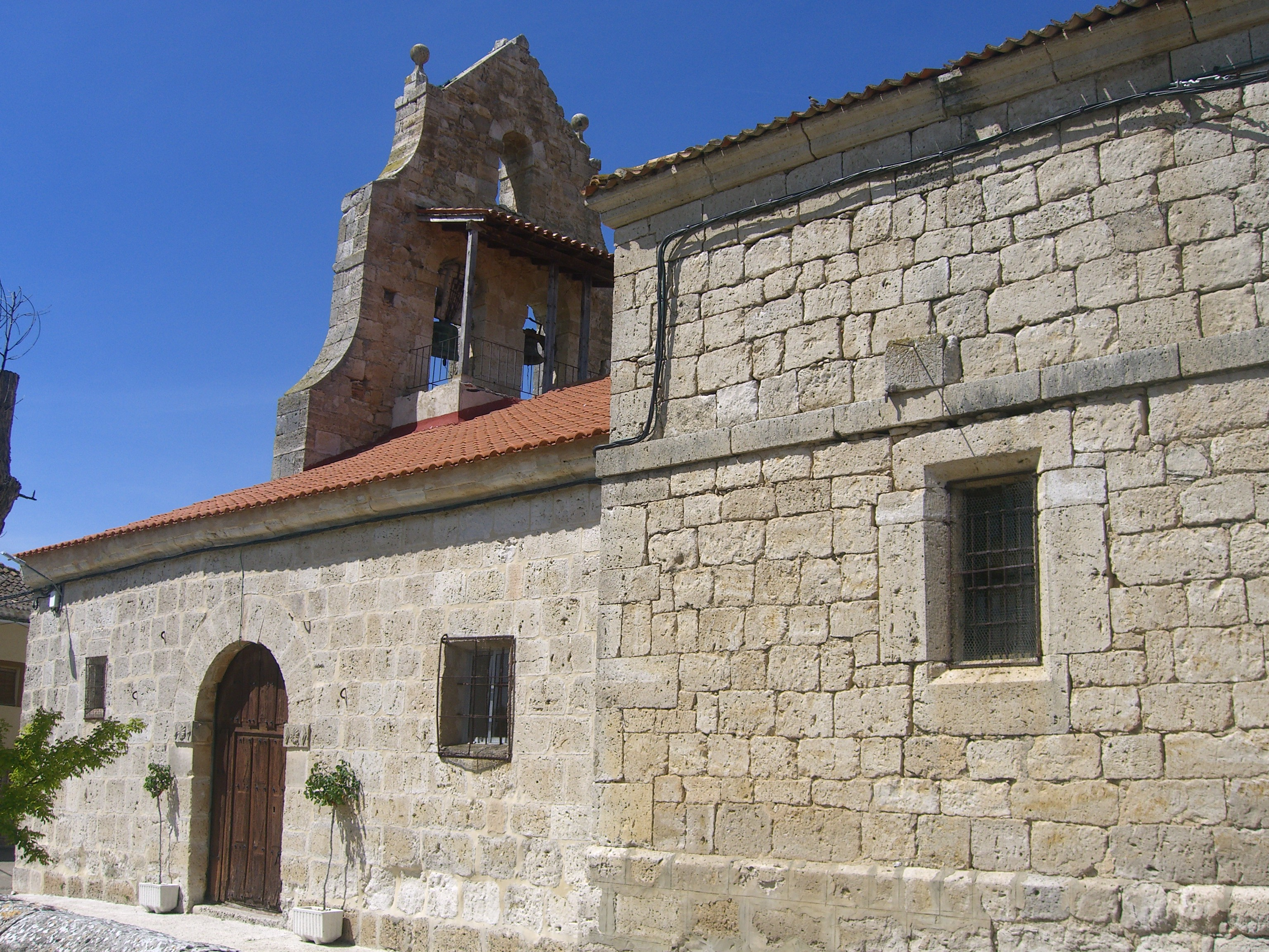 es la entrada unica a la iglesia de San Martin de Tours